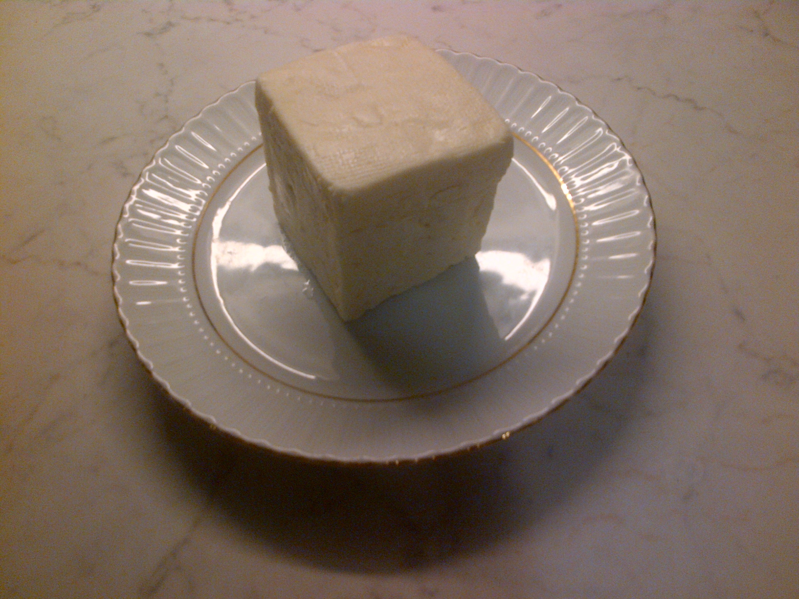 Beyaz peynir, denominacion de origen "Ezine", de leche de cabra.